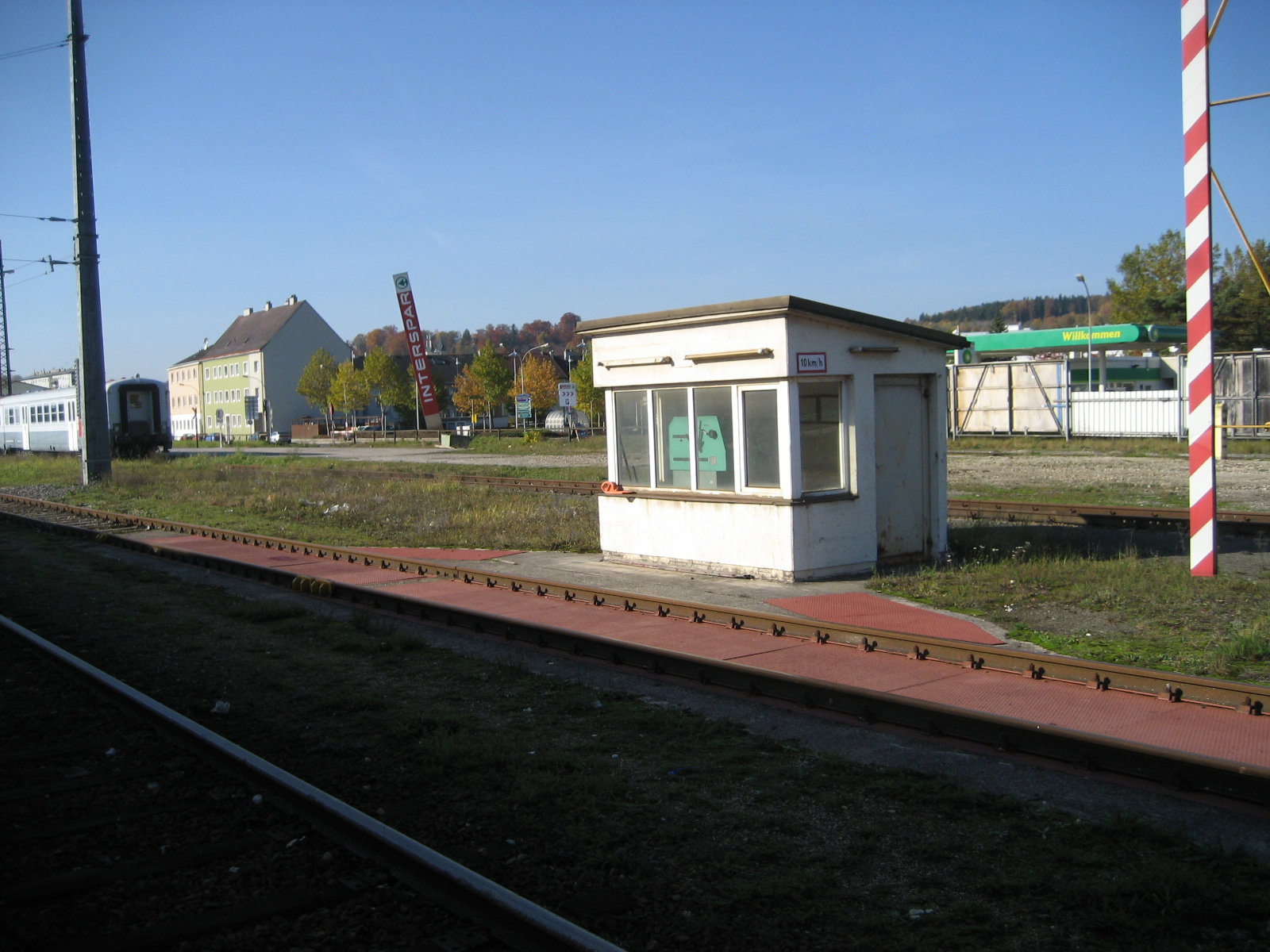 Gleisbrueckenwaage im Bahnhof Amstetten